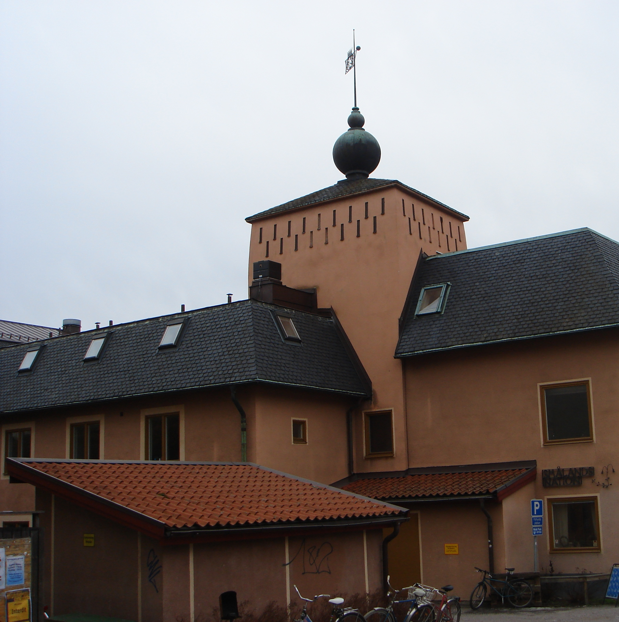 Smålands nation, Uppsala, Sweden